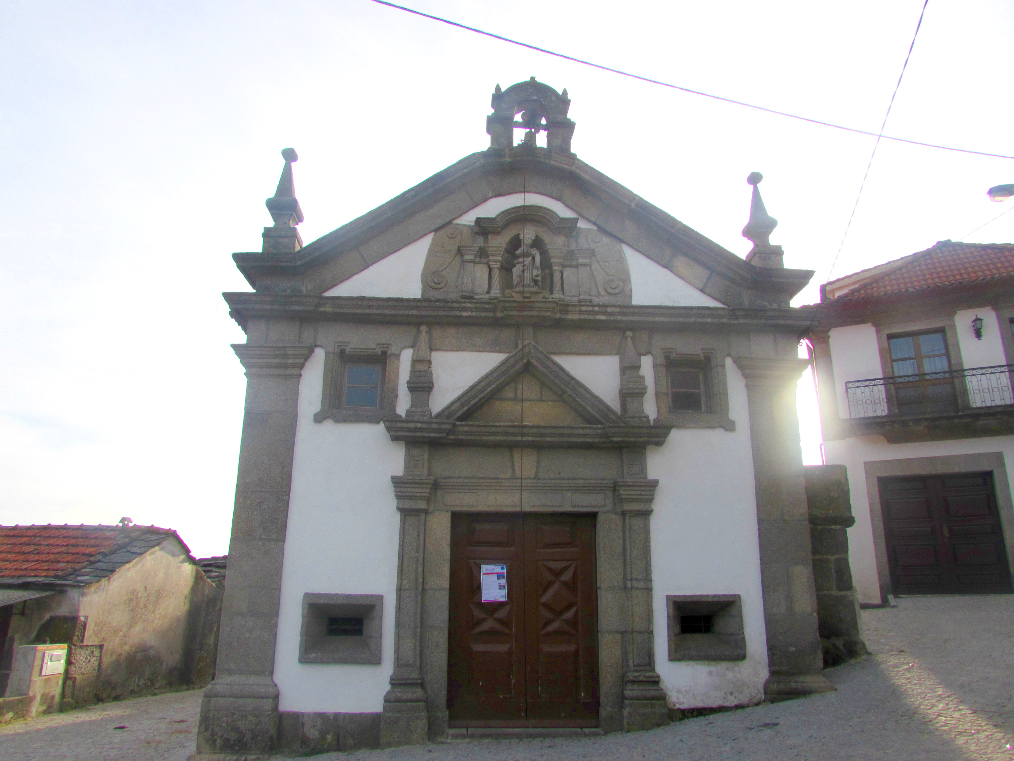 Capela de Santa Sofia - Gontães